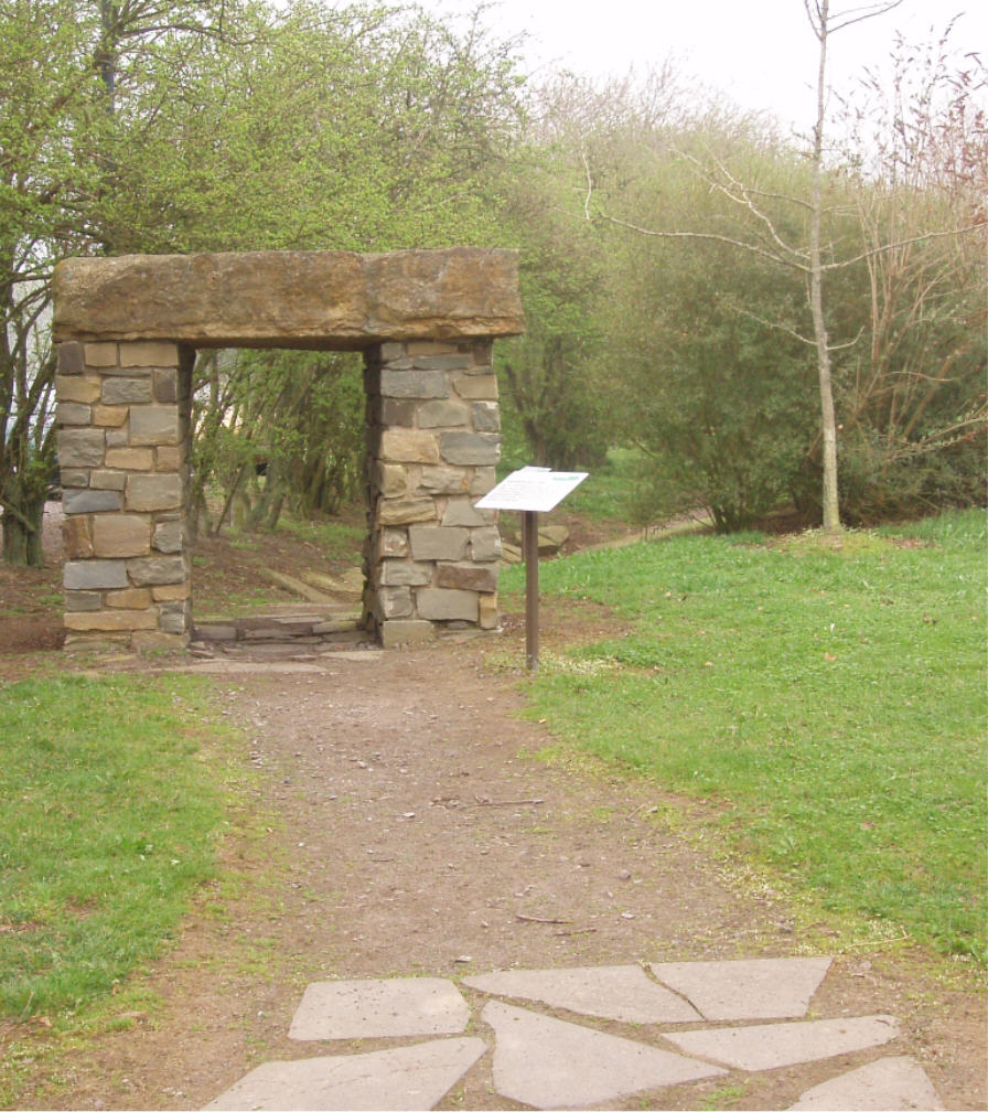 Devonisches Tor im Geogarten beim Bahnhof Engeln